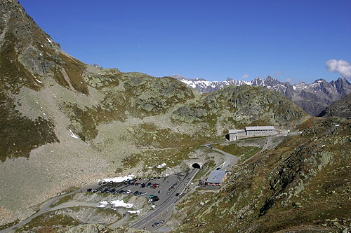 Sustenpass: Passhöhe